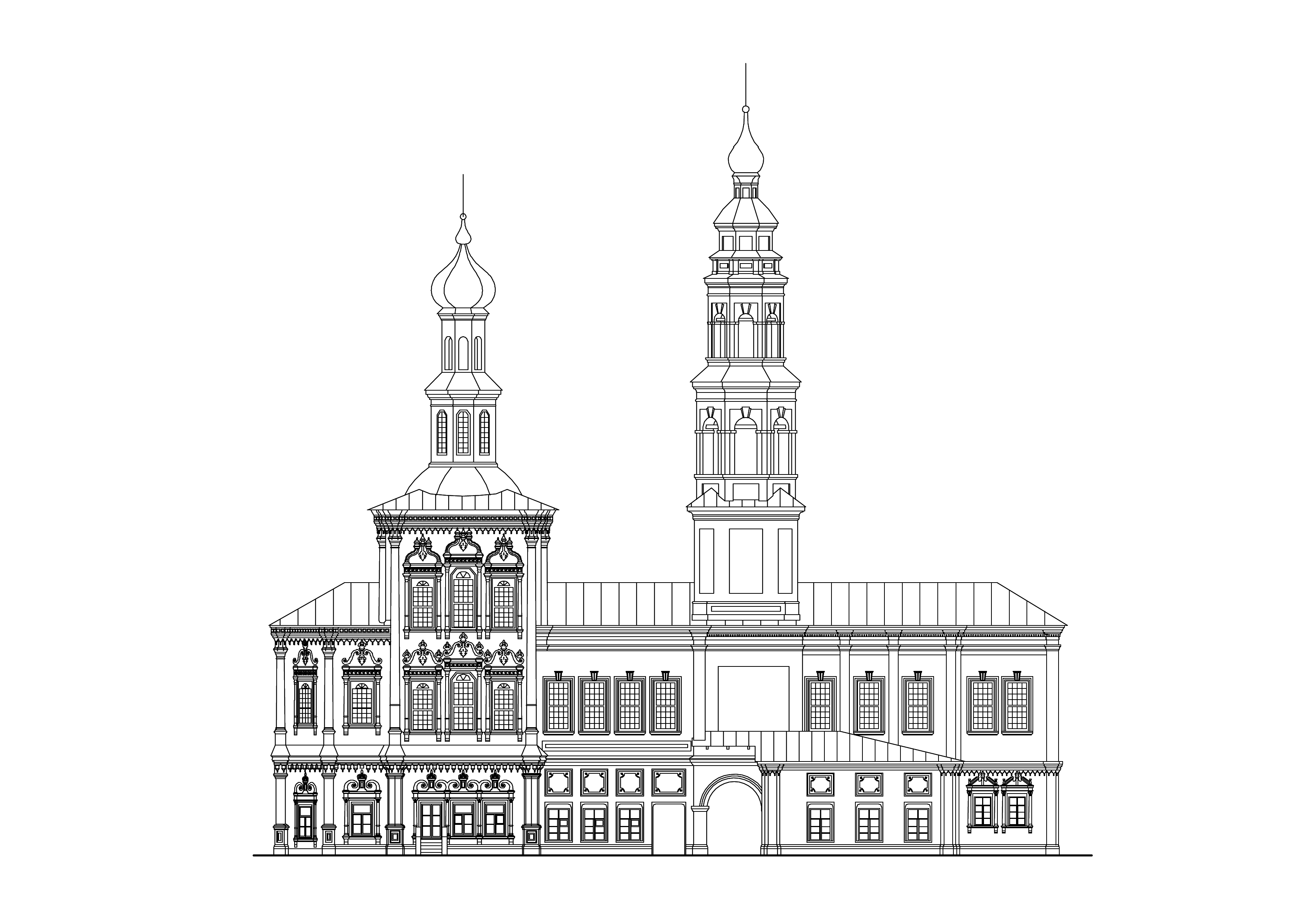 Церковь Иоанна Предтечи. Чертёж. Город Соликамск